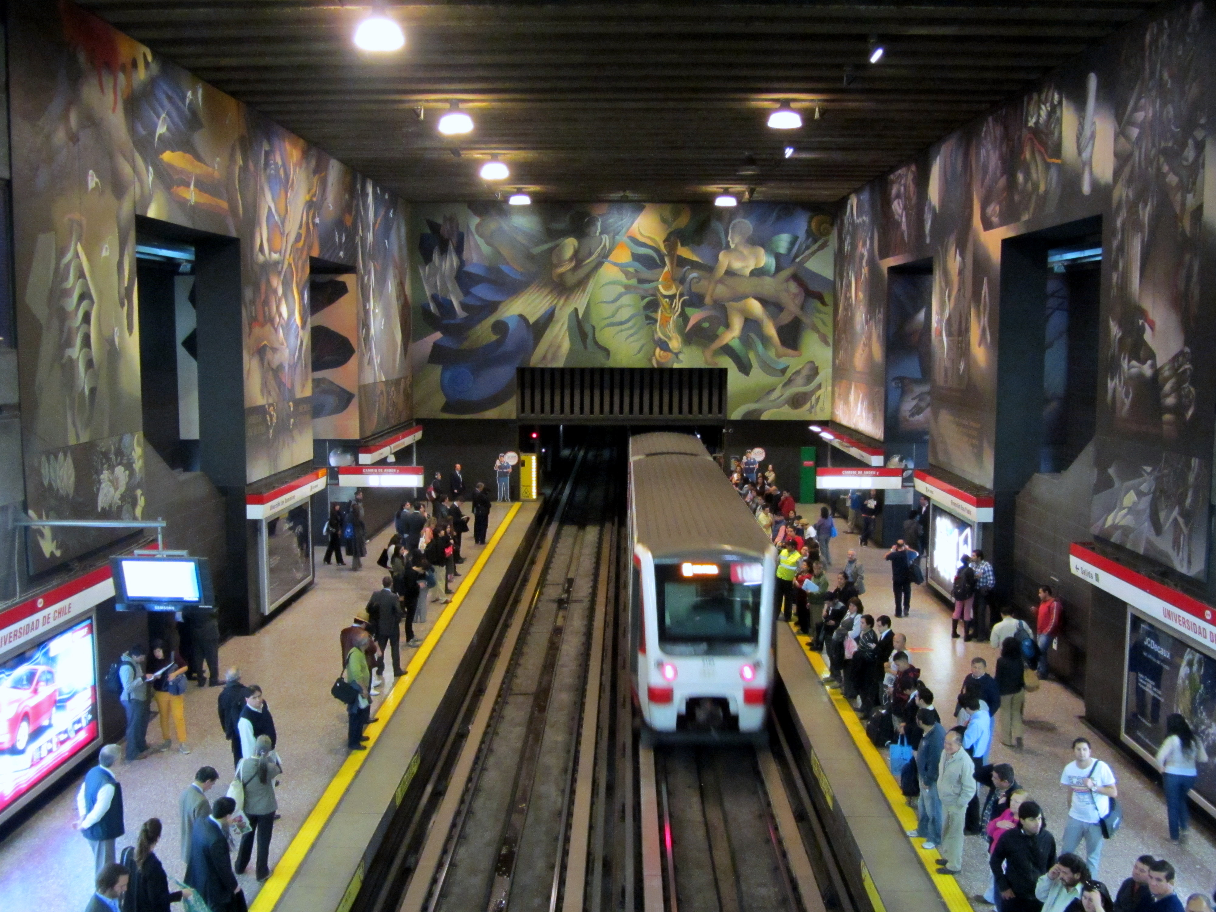 Tributo a nuestro océano, mural del pintor chileno Mario Toral que forma parte de la gran obra titulada Memoria visual de una nación, metro Universidad de Chile, en Santiago de Chile. Este panel está sobre el túnel poniente. A la izquierda (S), Homenaje a la poesía; a la derecha (N), Los conflictos.